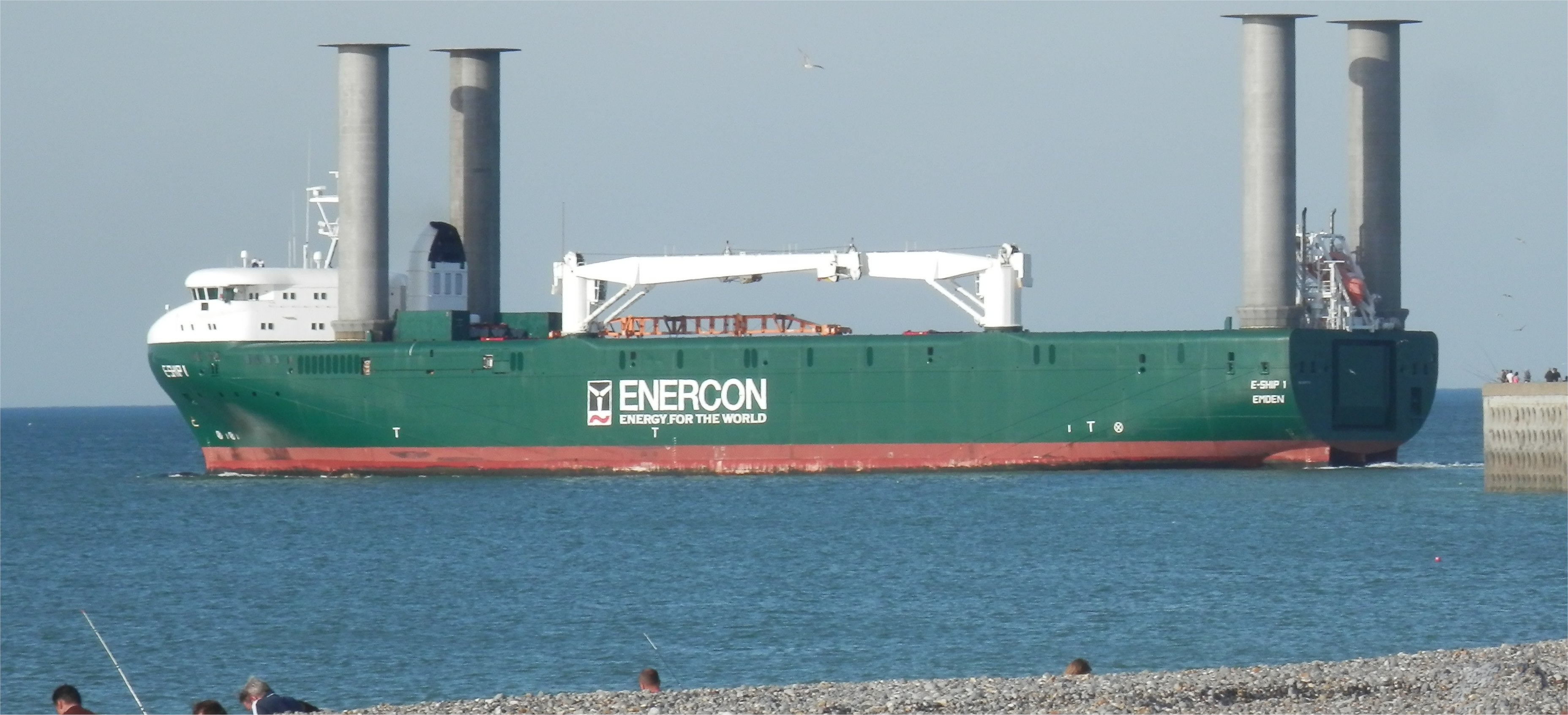 Navire Enercon de transport d'éoliennes sortant du port de Dieppe le 24 septembre 2016